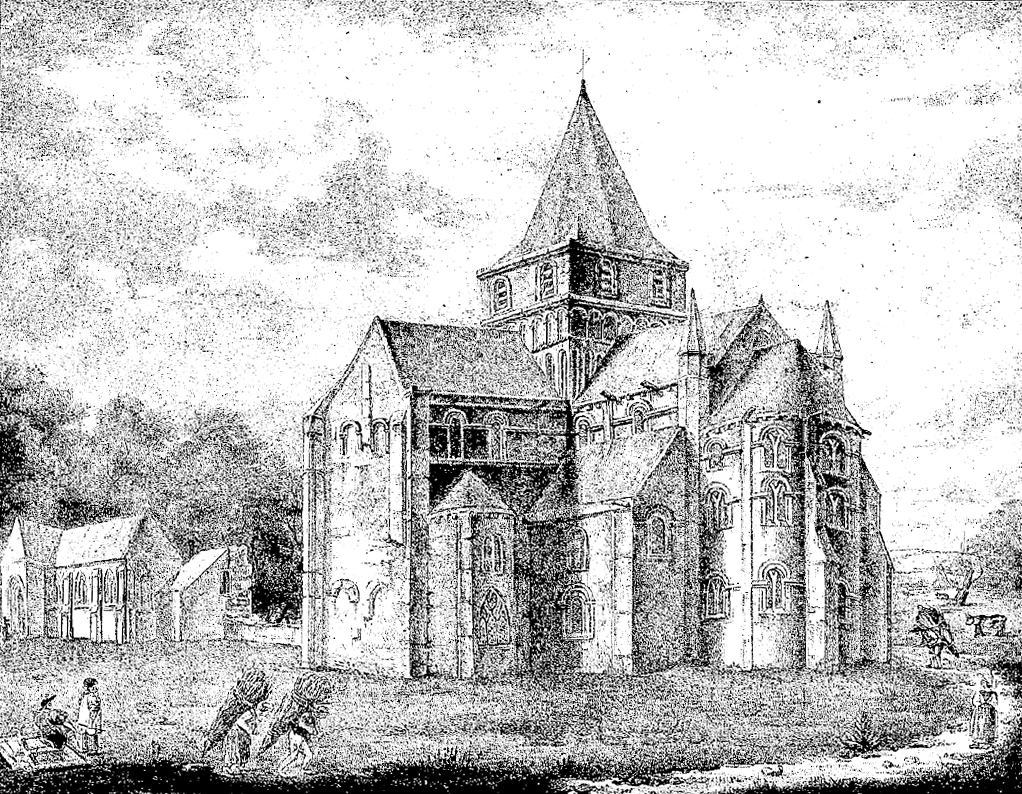 Vue de l'abbaye de Cerisy, lithographie